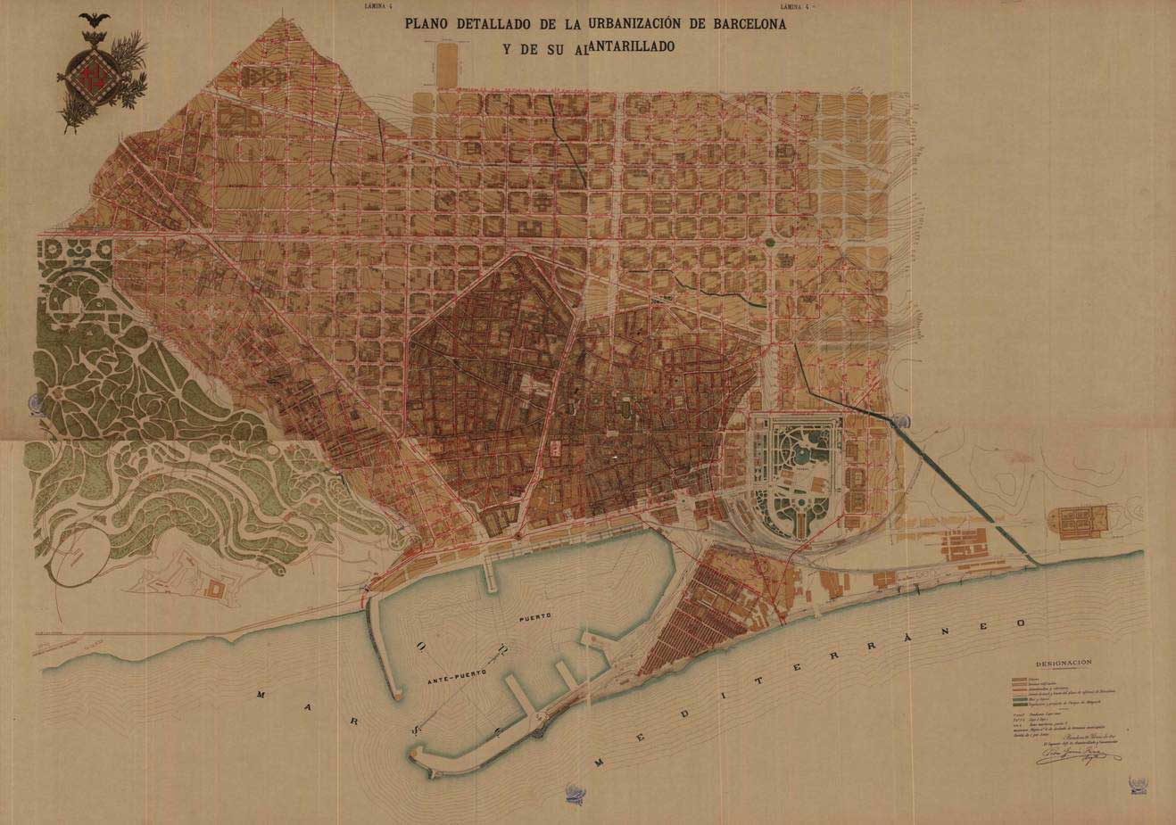 Proyecto de saneamiento del subsuelo de Barcelona: alcantarillado, drenaje, residuos urbanos (1891), de Pere Garcia Fària.